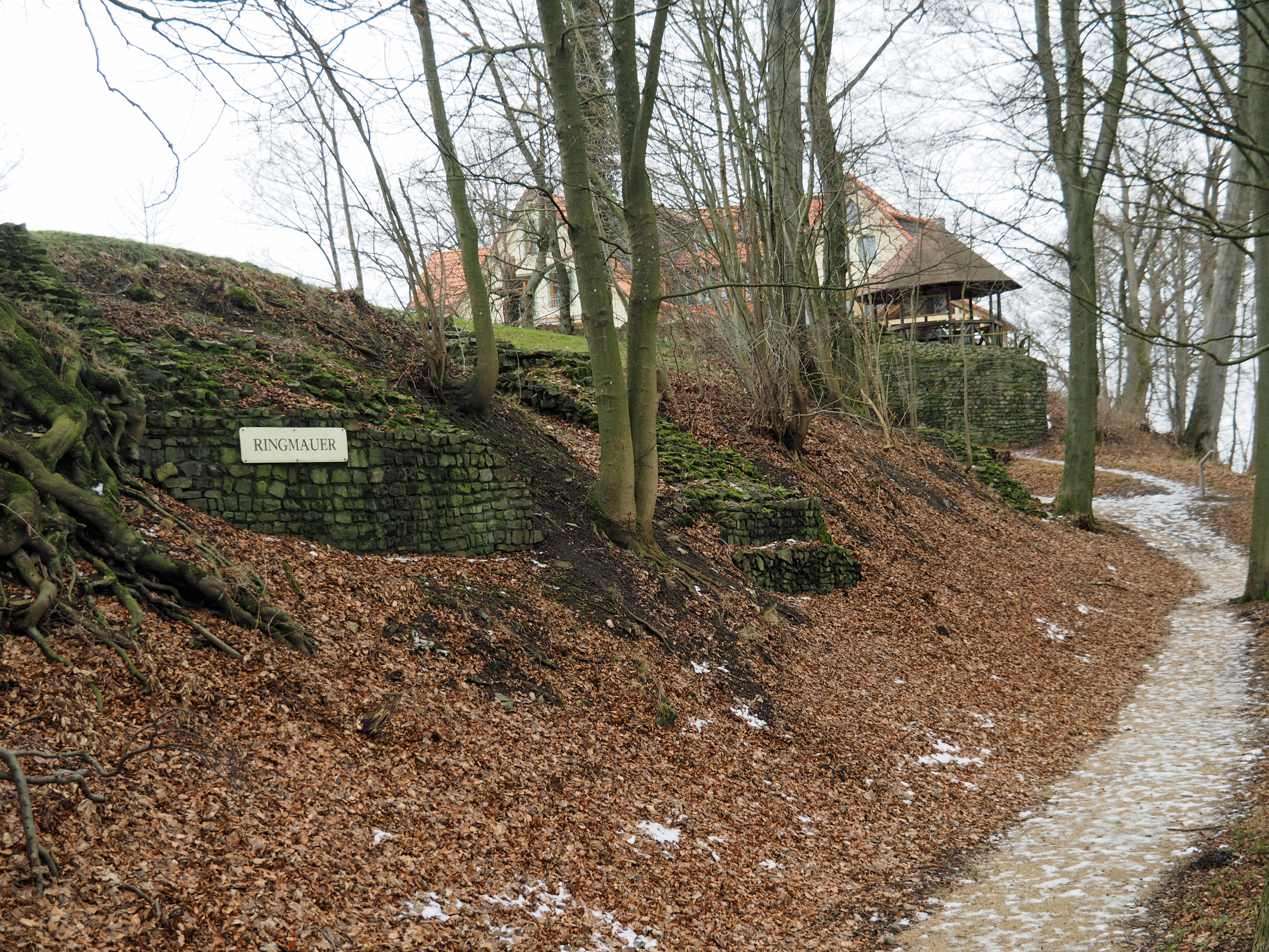 Wehr- und Ringmauer-Reste der Harzburg (11. und 12. Jahrhundert), Großer Burgberg, Bad Harzburg